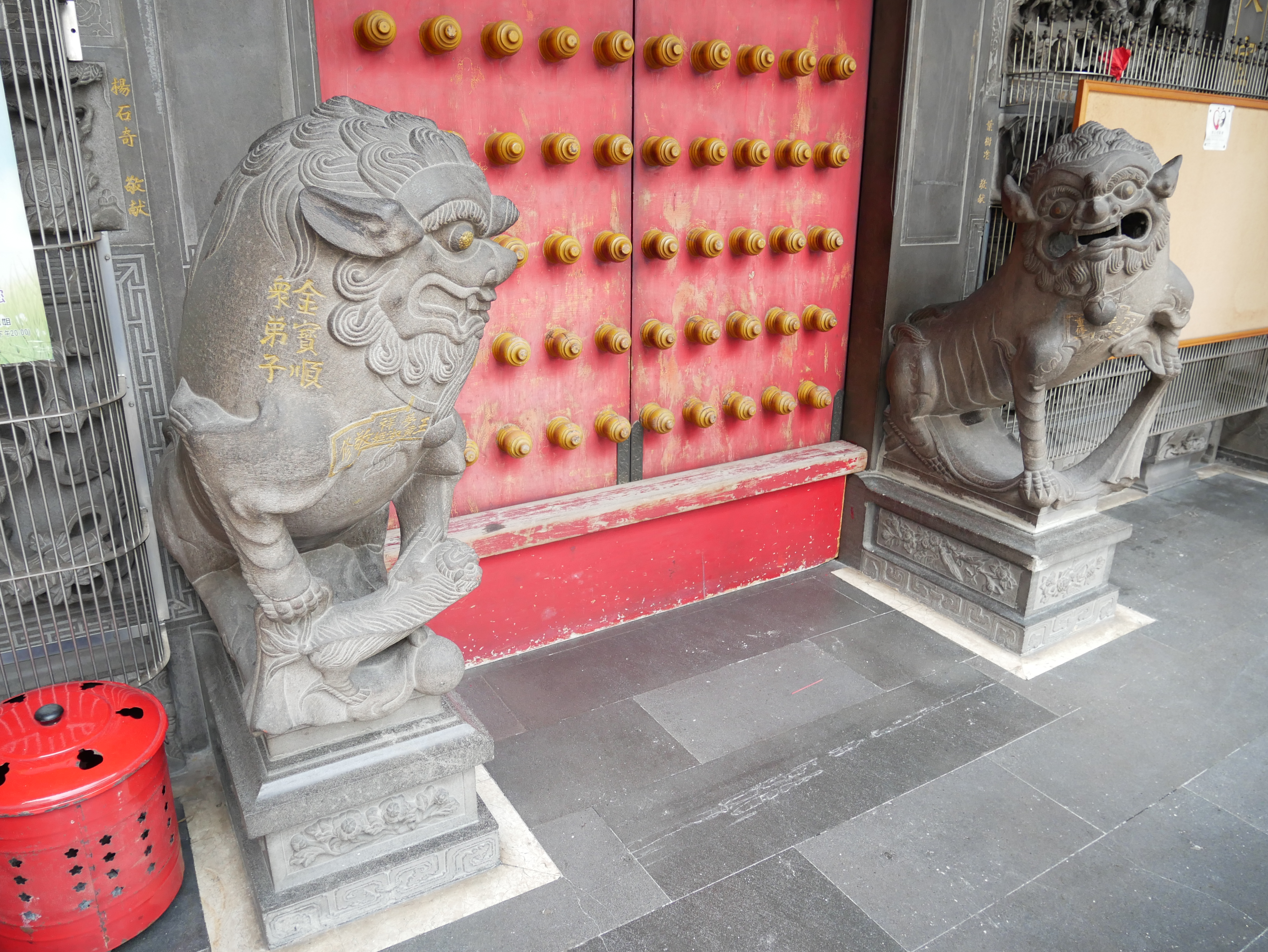 中文（台灣）: 新莊武聖廟石獅，新北市新莊區文衡里